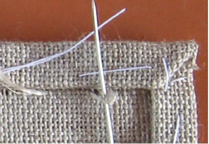 àjour